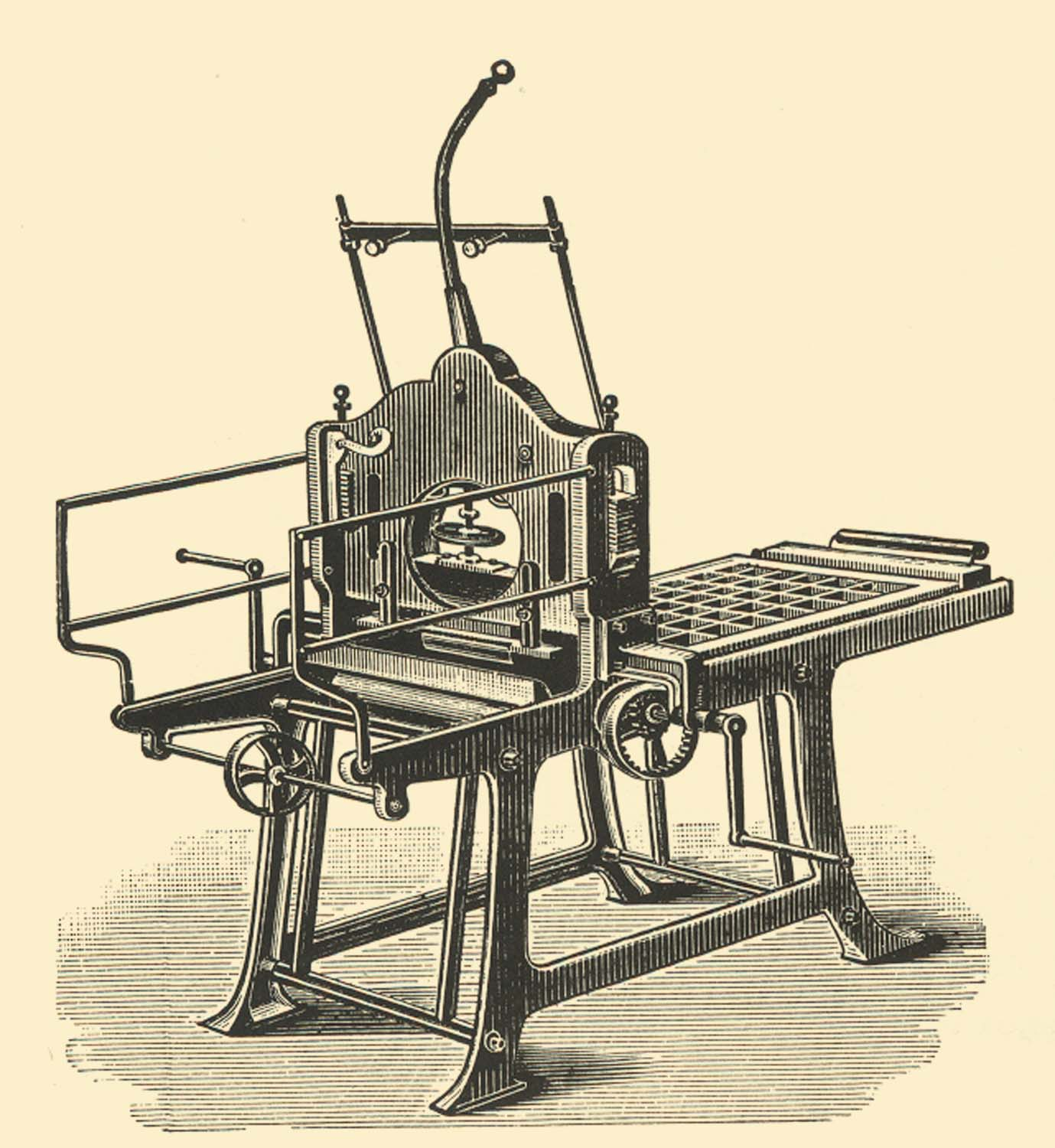 Gusseiserne lithografische Andruckpresse von Erasmus Sutter, 1839